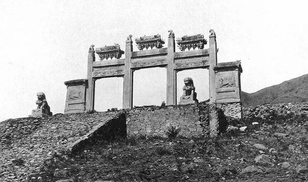 Ernst Boerschmann于1906-1909间所摄的北京香山宝谛寺石牌坊